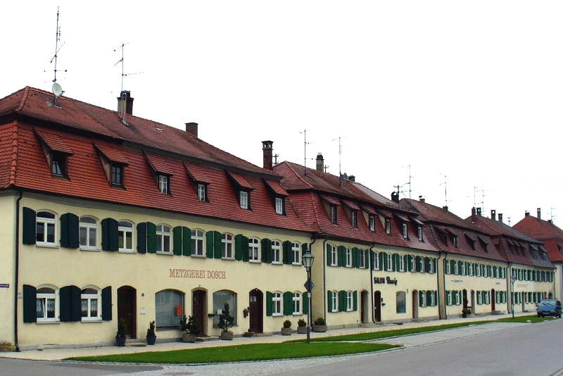 Oberdischingen Foto von Benutzer:Enslin selbst fotografiert am 16.5.2005